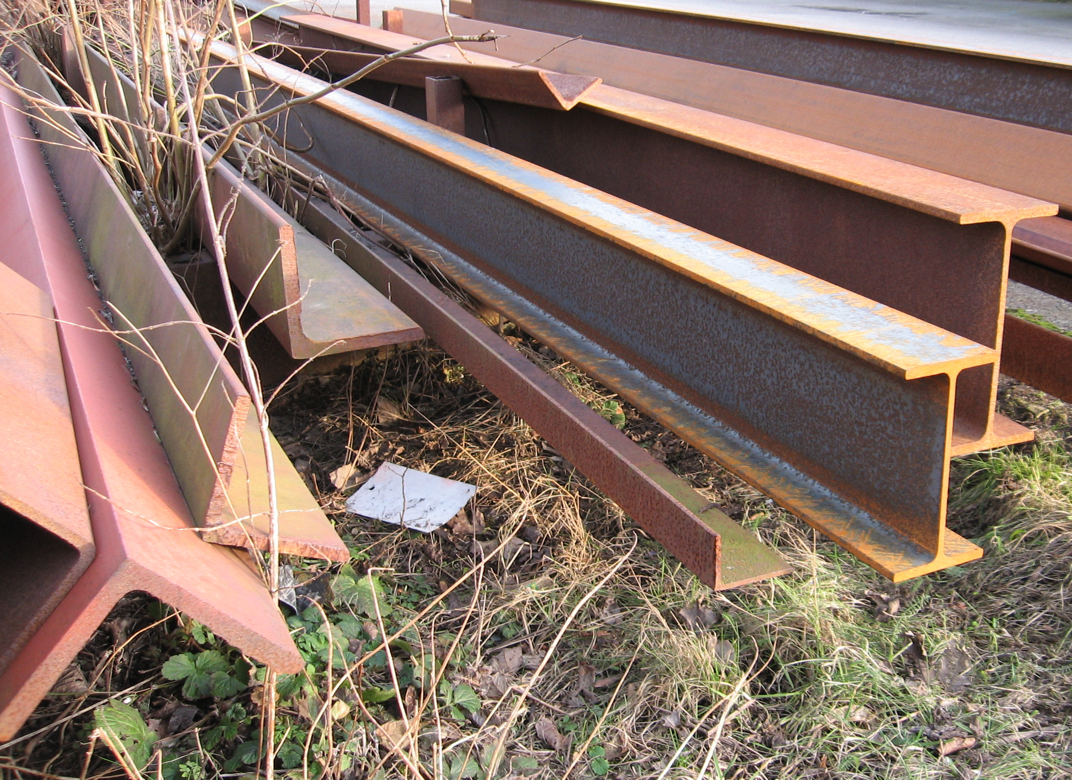 Stålprofiler